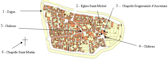 Cliquer pour agrandir.